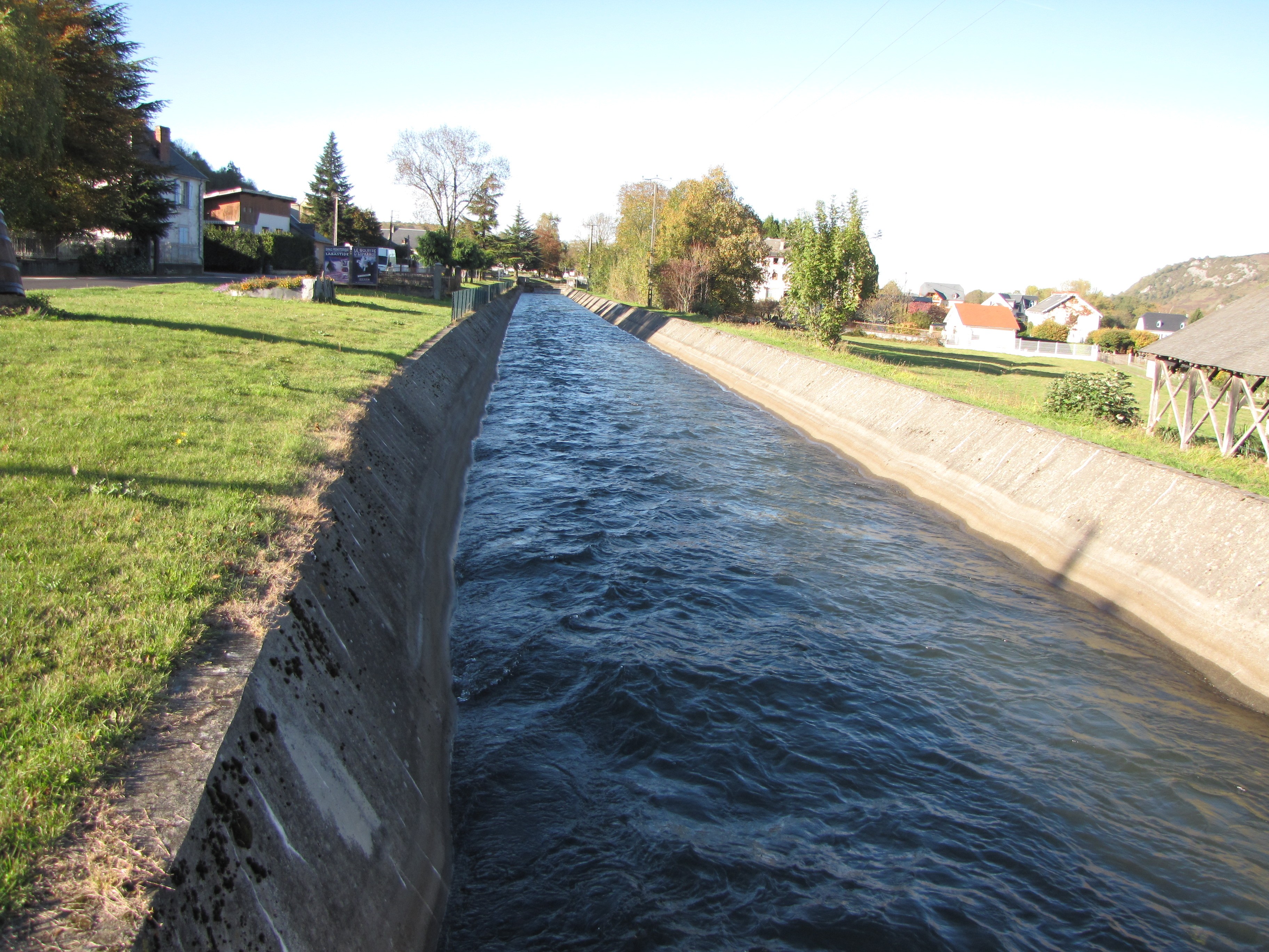 Canal de la Neste